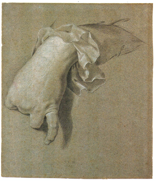 Etudes pour le portrait de Philipp-Ludwig Wenzel von Sinzendorf par Hyacinthe Rigaud